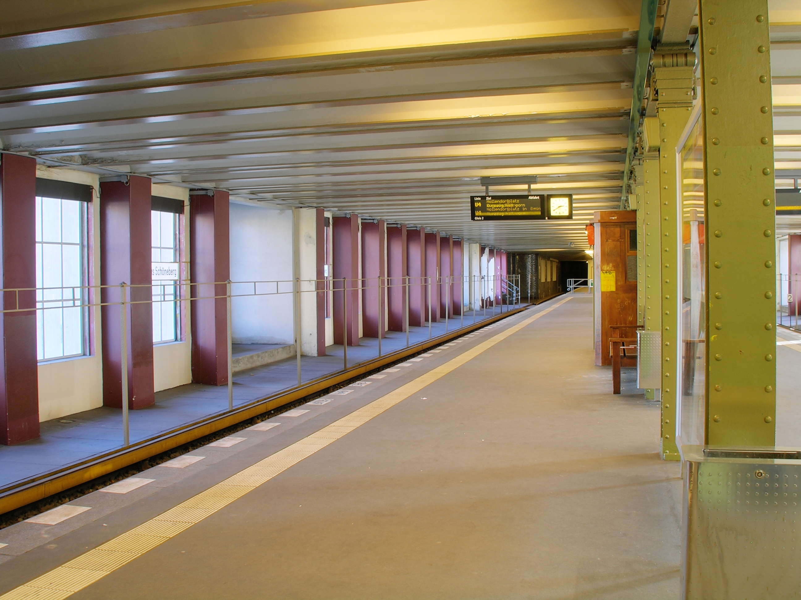 Berliner U-Bahnhof Rathaus Schöneberg, Bahnsteig mit Blick auf das Gleis Richtung Bayerischer Platz/Nollendorfplatz und die östliche Fensterfront, zusammengesetzt aus mehreren Bildern mit verschiedener Belichtung